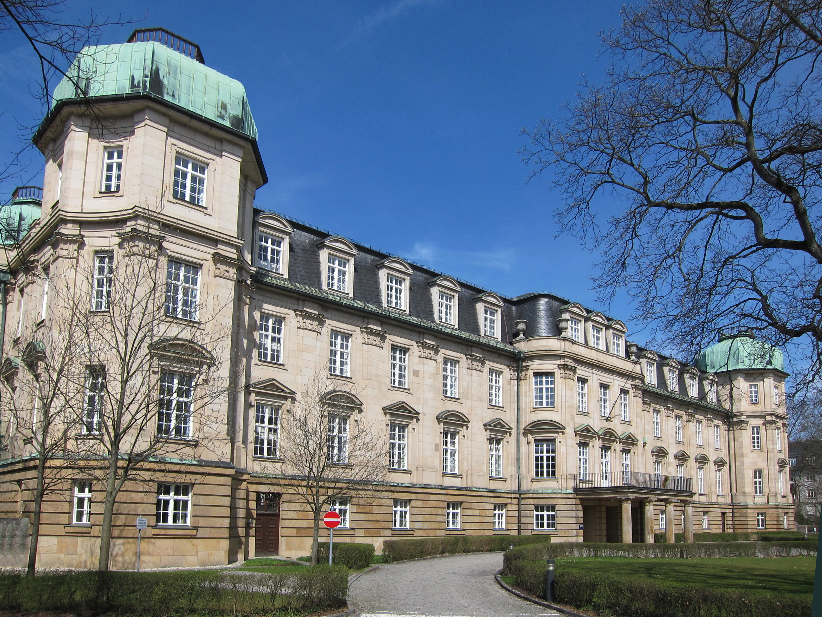 Bundesfinanzhof, Ismaninger Straße 109; schlossartiger, neubarocker Monumentalbau mit Ecktürmen, Hausteinfassaden, begonnen 1909 von Heilmann & Littmann als Privatbau, 1921-23 vollendet; in großem Garten gelegen.